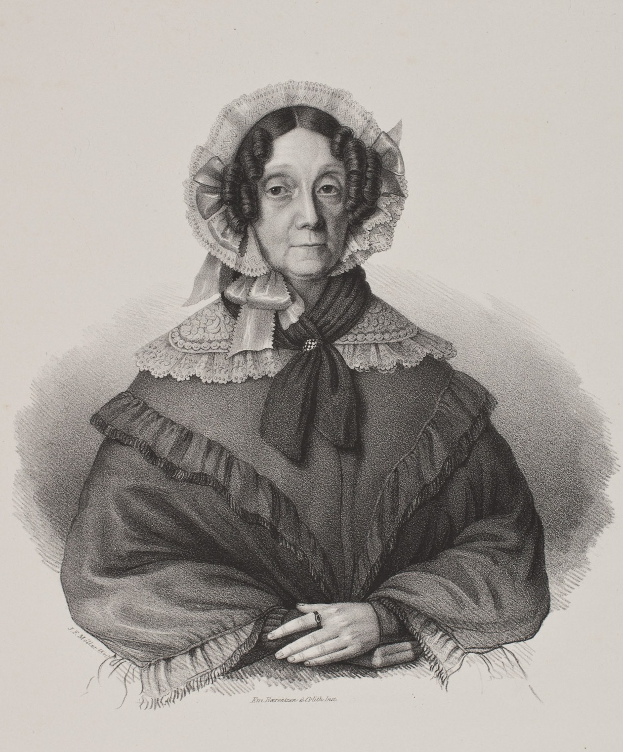 Варвара Александровна Вяземская (1774—1849), с 1791 года в браке с датским посланником бароном Нильсом Розенкранцем (1757-1824).